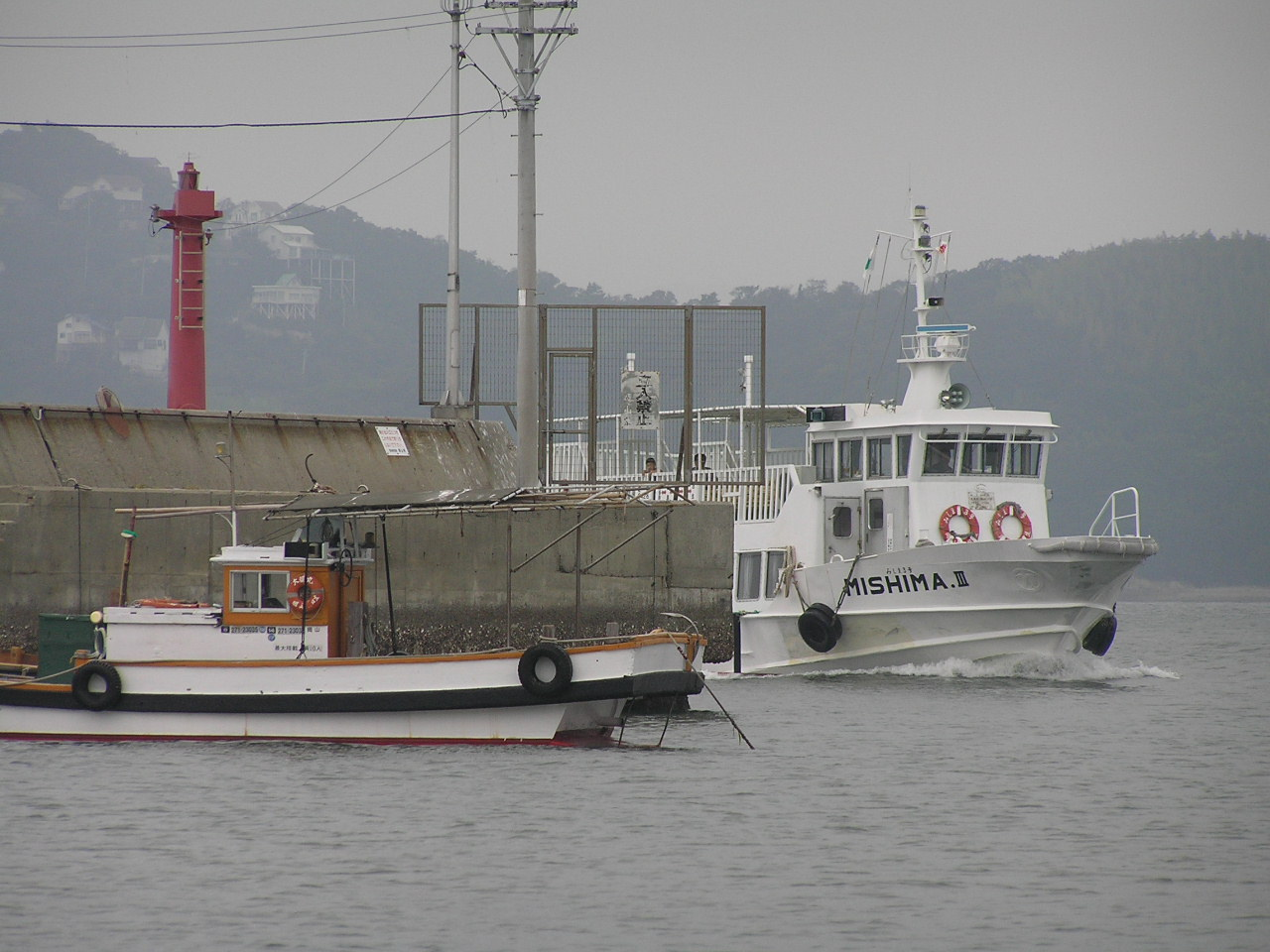 Kashira island in Bizen, Okayama,Japan 岡山県備前市日生町日生,頭島